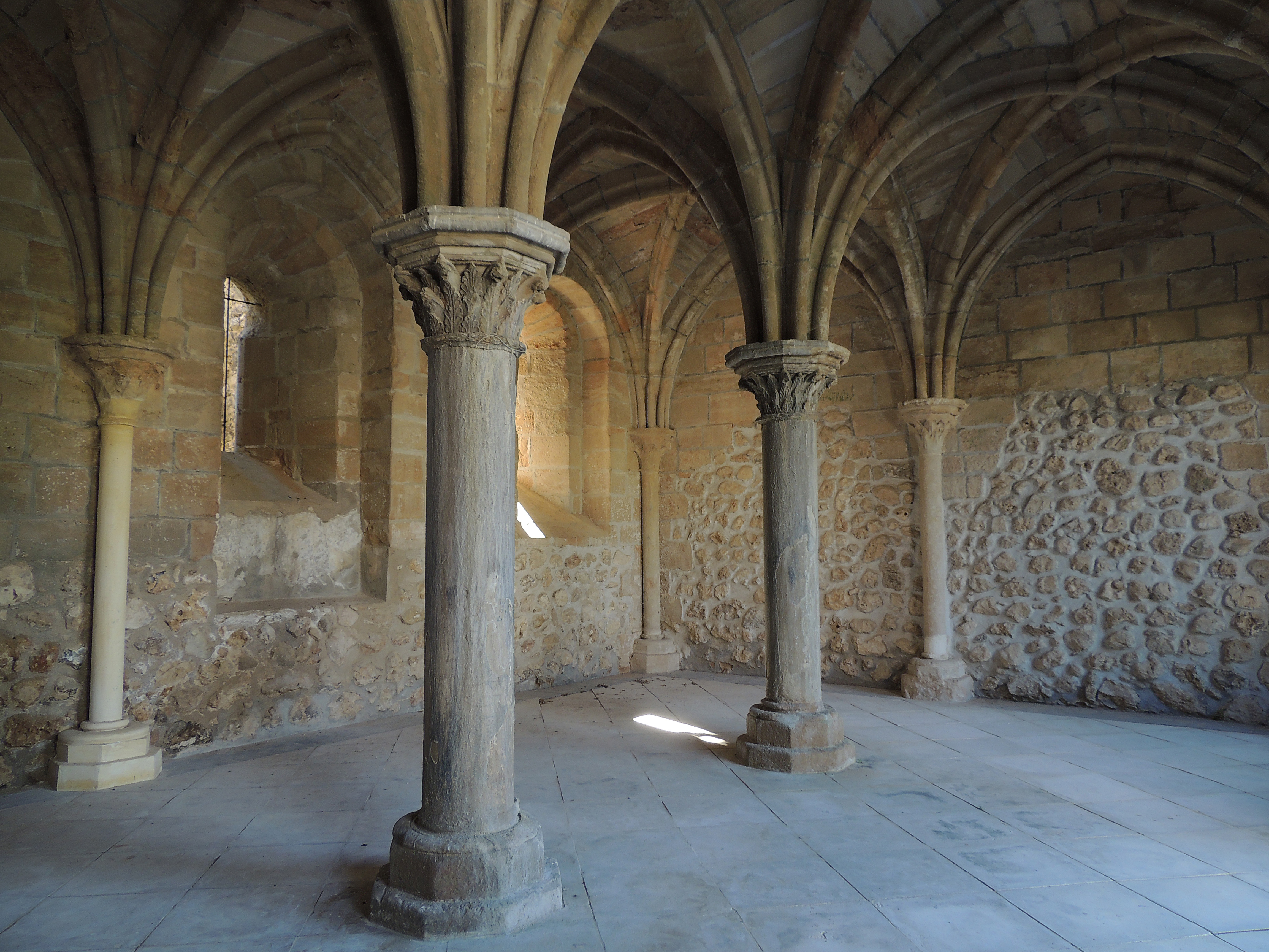 Sala capitular del monasterio de Monsalud